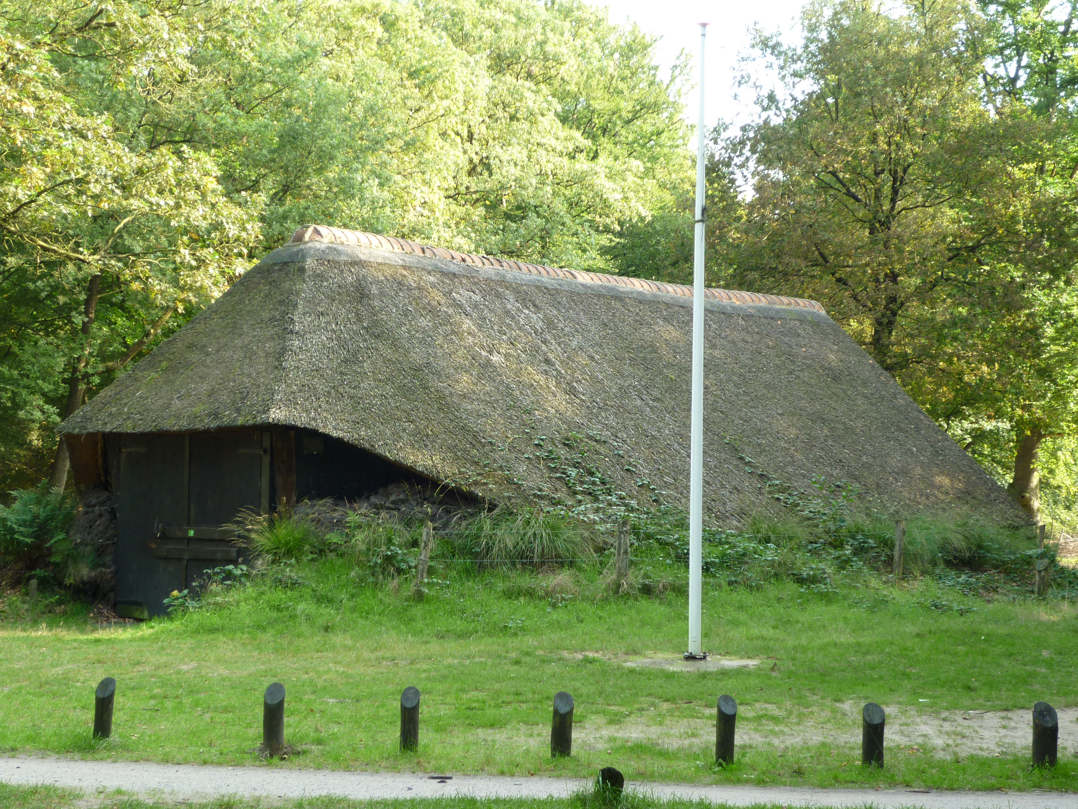 Schaapskooi - Hoge Boeschoterweg bij 78, Garderen